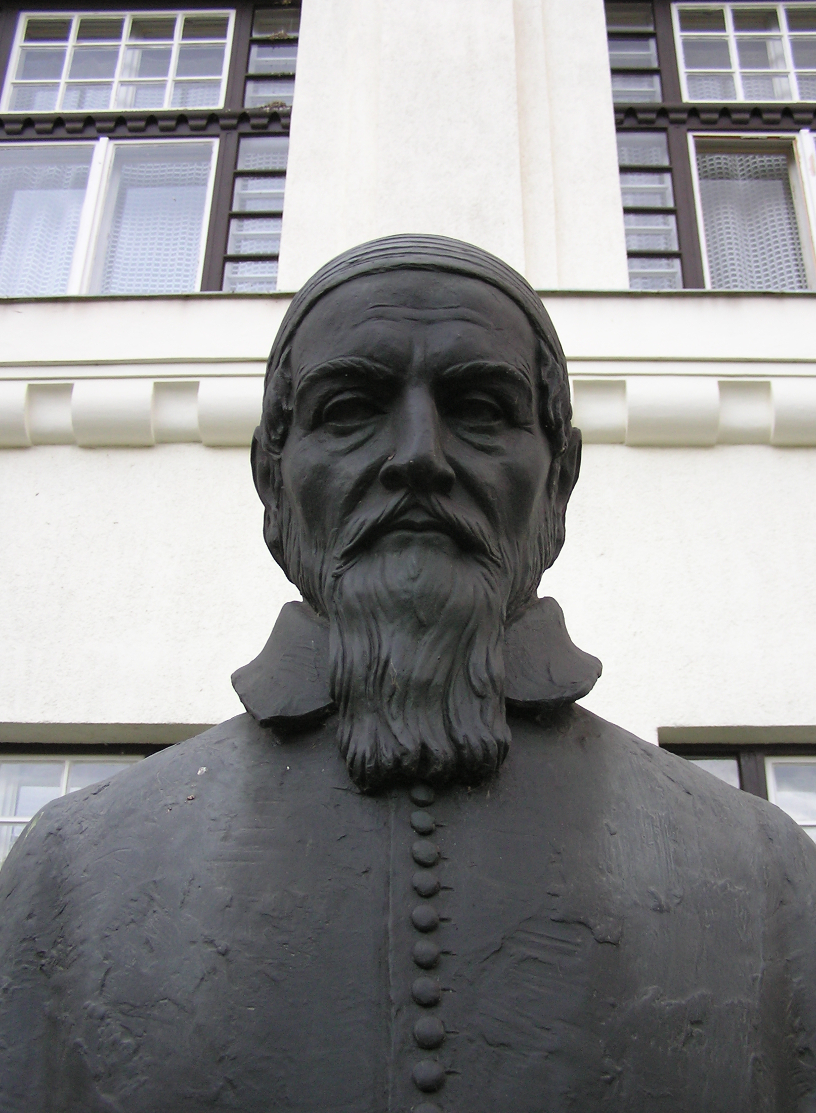 Busta Jana Amose Komenského v maďarském městě Sárospatak. Comenius-mellszobor ( Pátzay Pál, 1970, bronz ). Magyarország, Borsod-Abaúj-Zemplén megye, Sárospatak, Eötvös utca 7., a főiskola előtti parkban, az épület előtt áll a mellszobor.